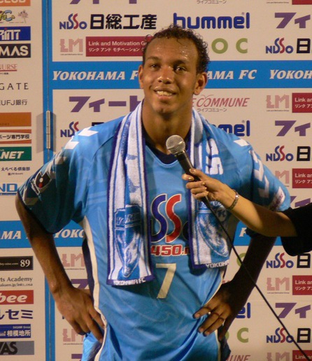 アレモン